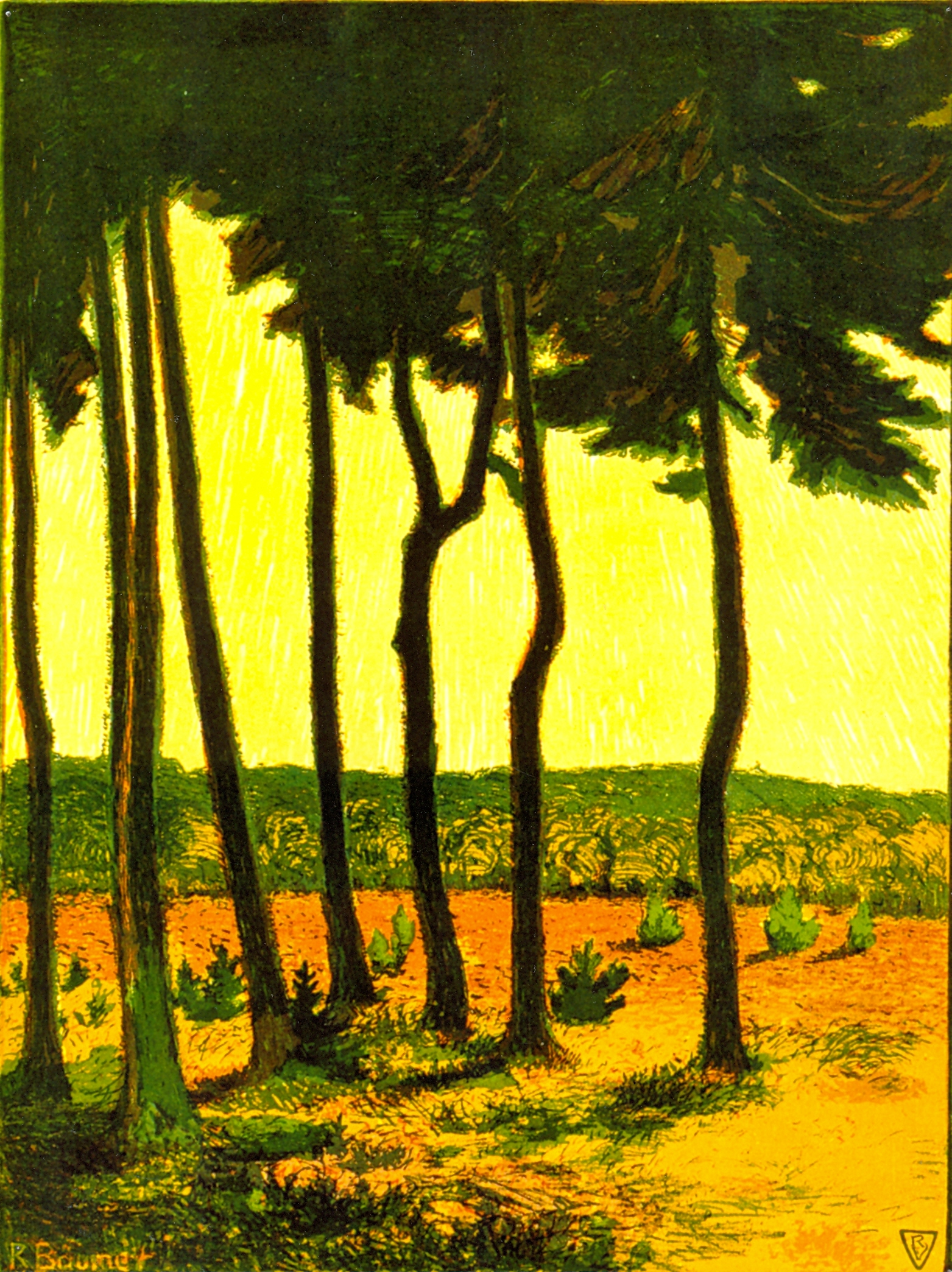 Nordische Heide um 1915 Farblithografie 41 x 30,5 Sign. u. li. mit R. Bäumer